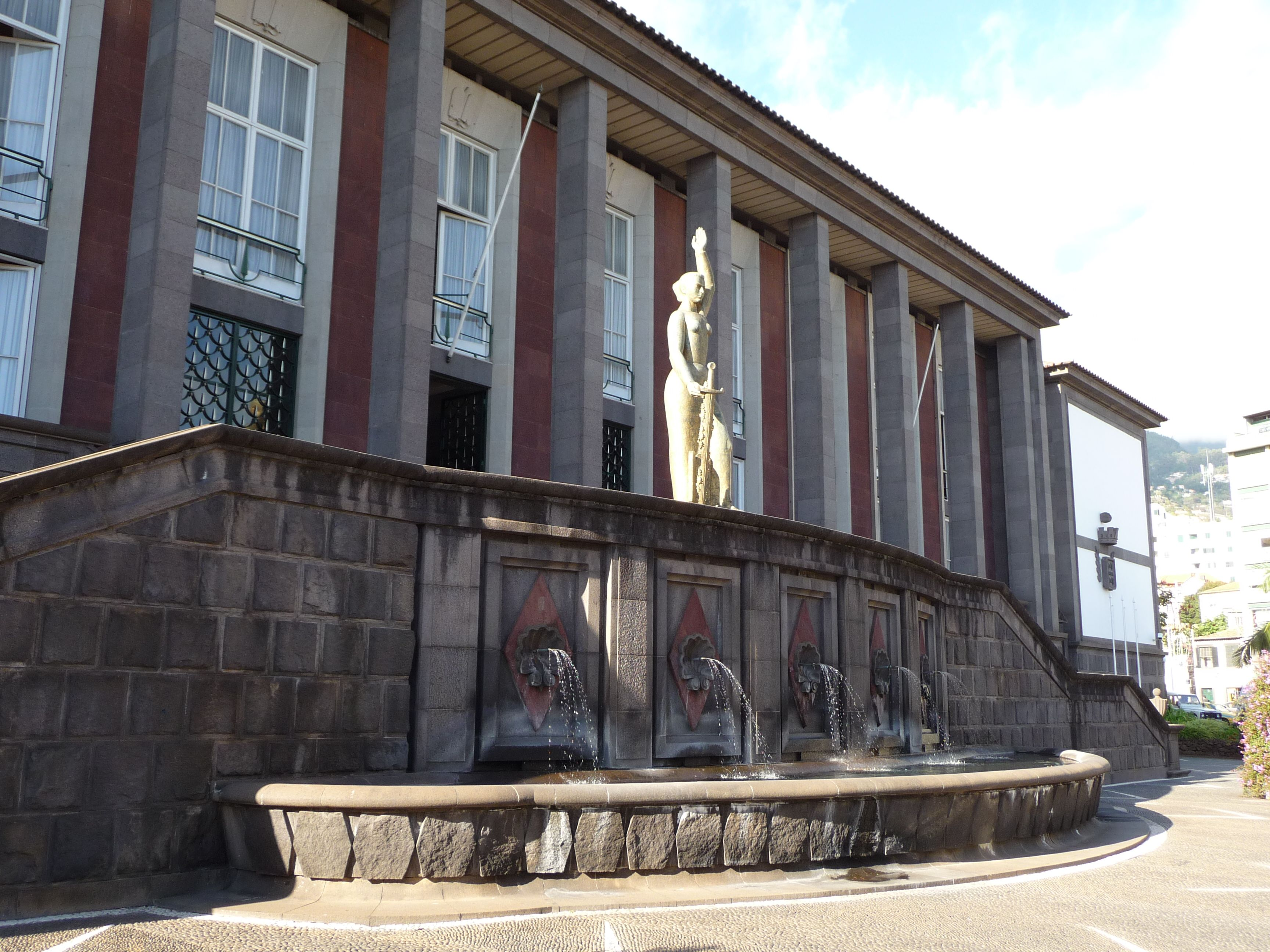 Justitia szobra az Igazságügyi Palota (bíróság) előtt (Funchal, Madeira)